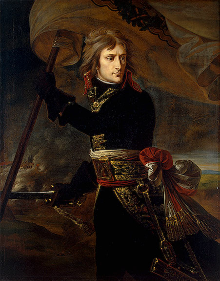 Napoleon s praporem